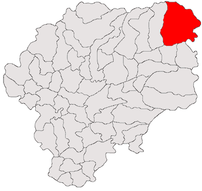 Categorie:Hărţi ale judeţului Bistriţa-Năsăud